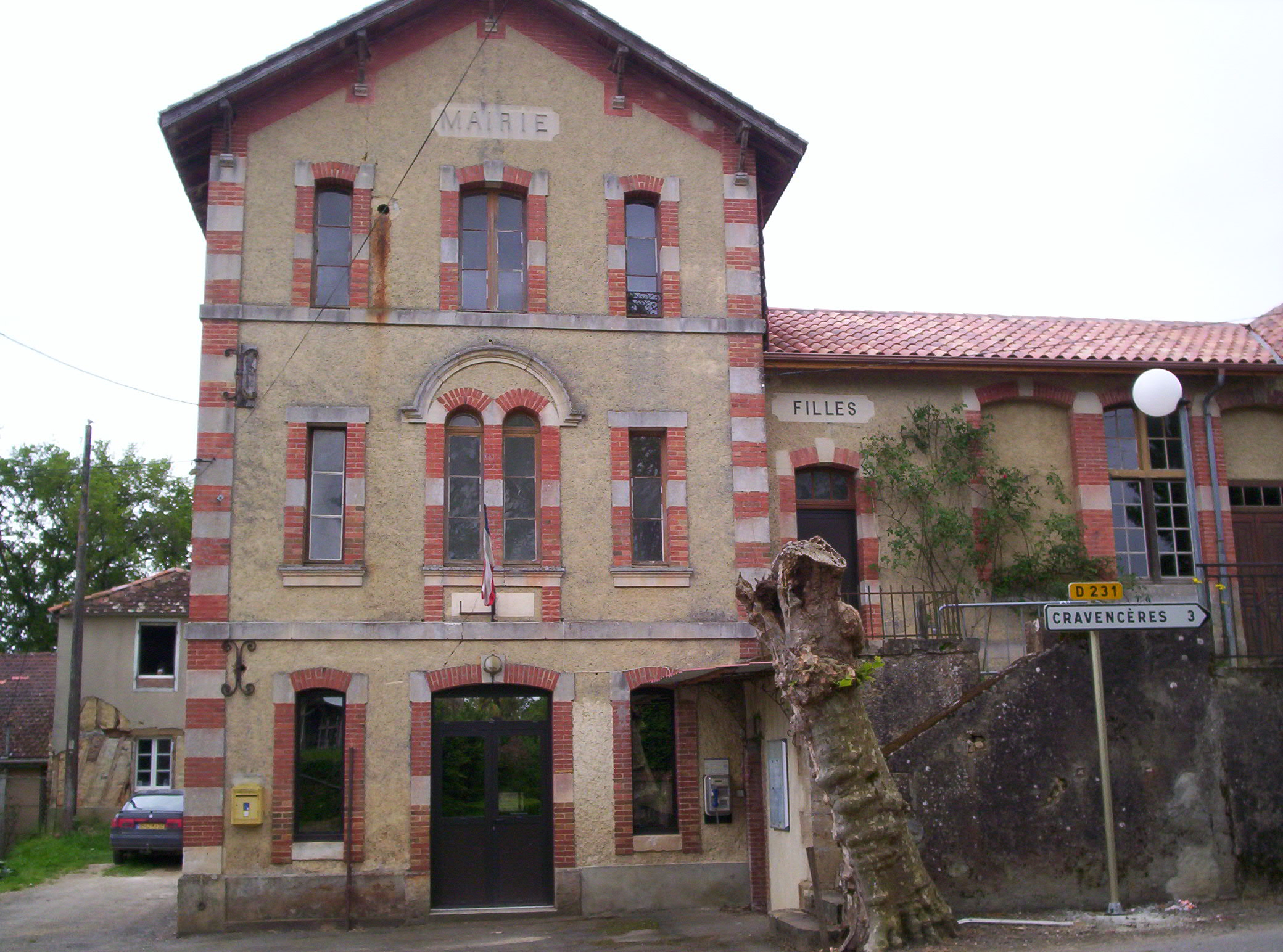 La mairie d'Espas au rez-de-chaussée, un appartement au-dessus et l'ancienne école, reconvertie en salle des fêtes, sur le côté.